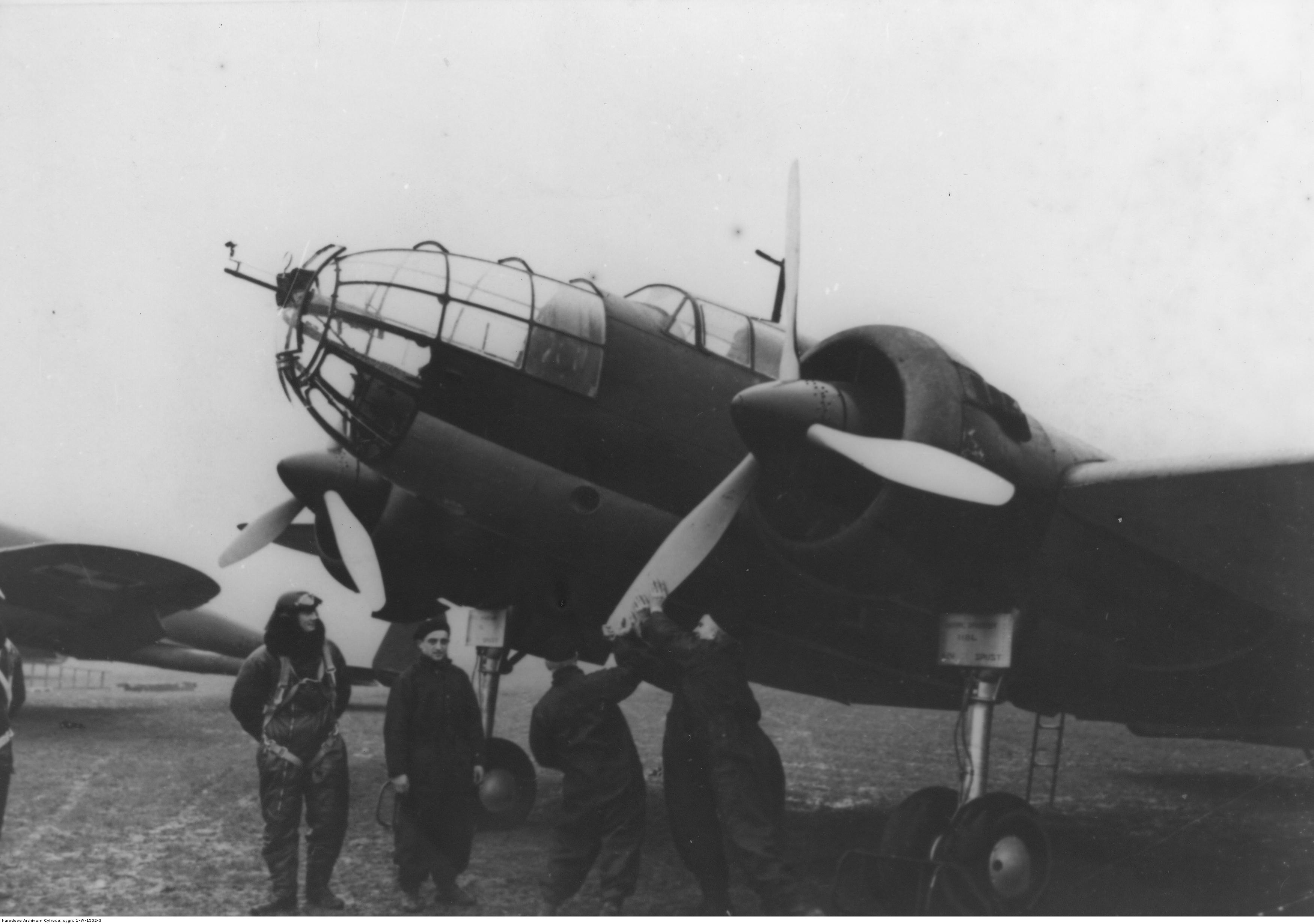 Załoga i obsługa samolotu PZL.37 Łoś przy maszynie.